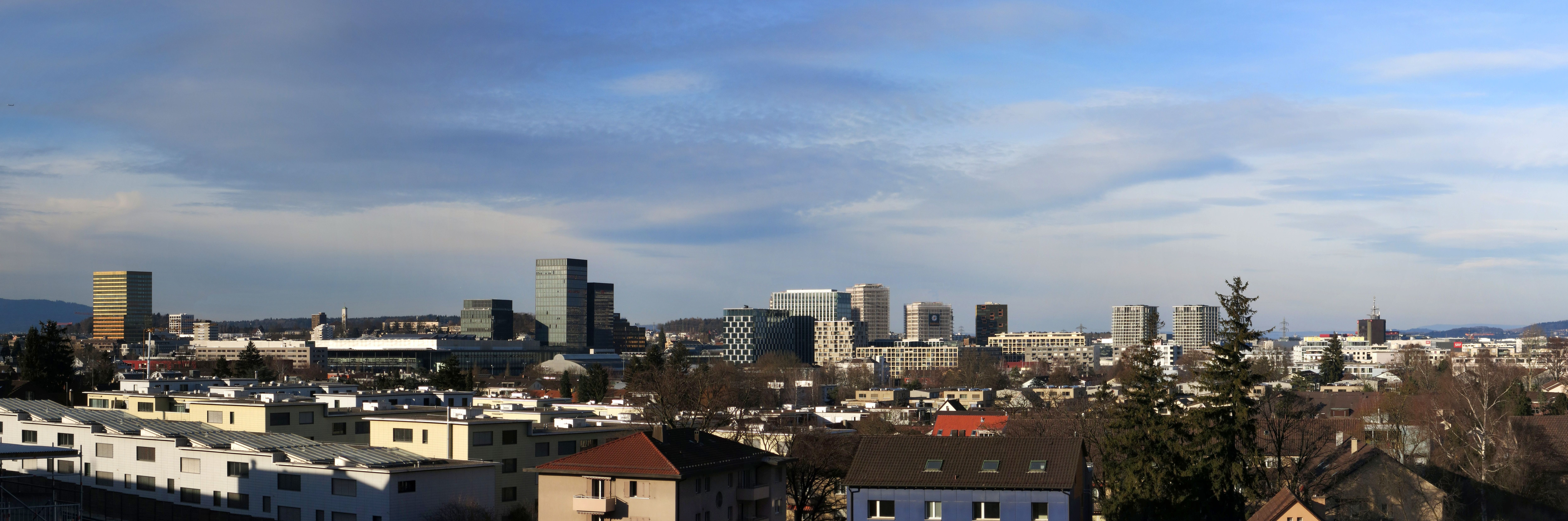 Skyline des Zürcher Stadtkreis 11